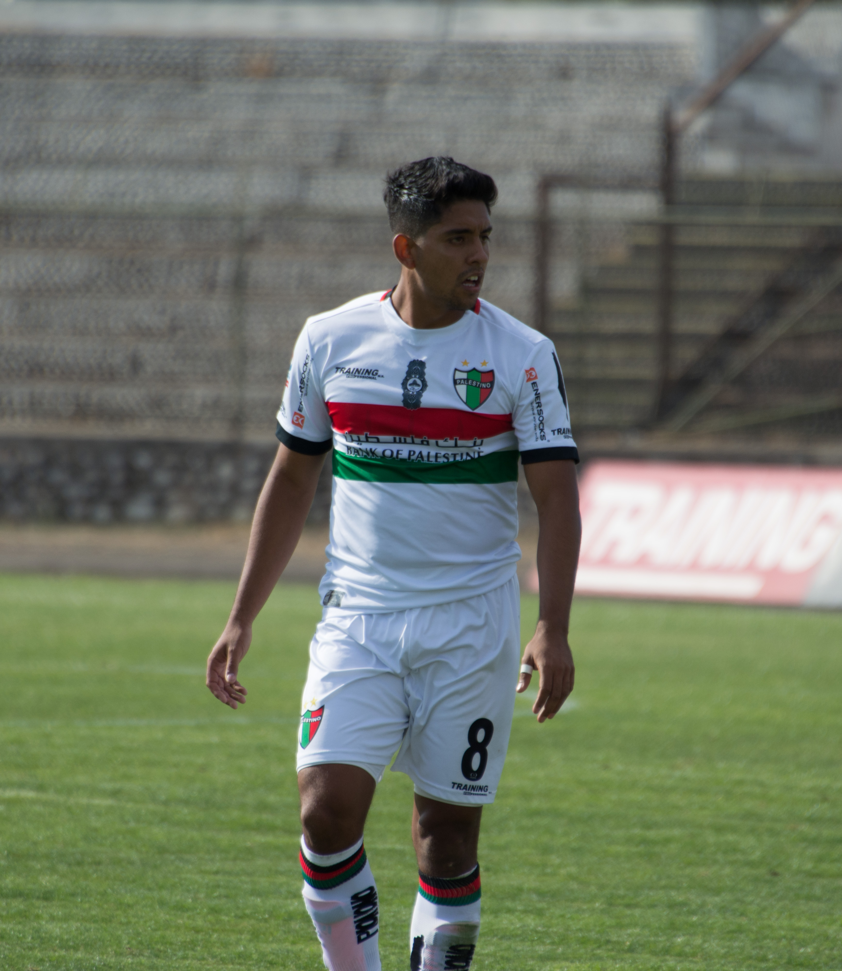 Fabián Manzano, Palestino v Universidad de Concepción, Estadio Municipal de La Cisterna, La Cisterna, Santiago, Chile.